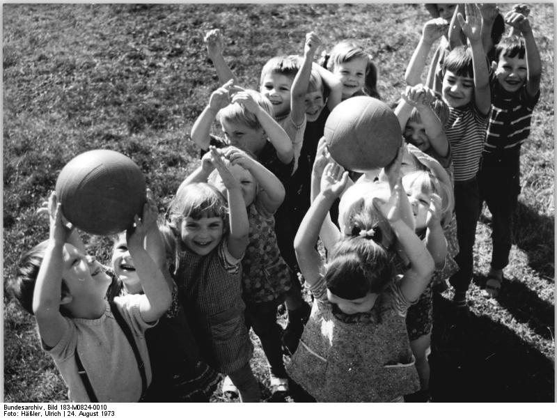 Spielende Kindergartenkinder ADN-ZB Häßler 24.8.73 Bez. Dresden: Fröhliche Spiele der Kleinen. Alle Kinder bekamen einen Platz im Kindergarten, damit die Eltern ohne Sorge um die Kleinen die Ernte einbringen können. Allein im Kreis Großenhain wurde zur Erntezeit 12 Erntekindergärten eingerichtet.